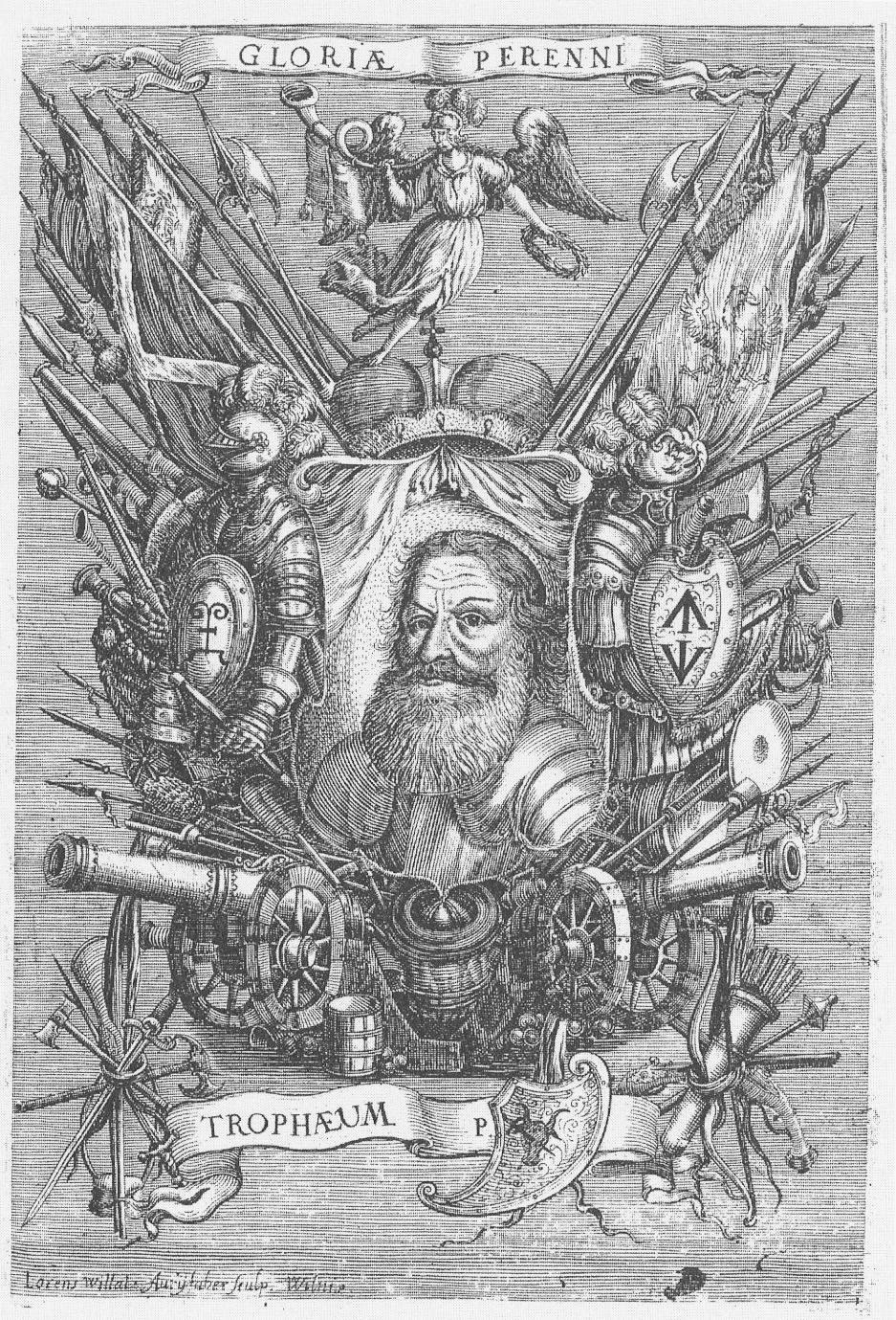 Беларуская (тарашкевіца): Партрэт Аляксандра Агінскага (Alaksandar Aginski)